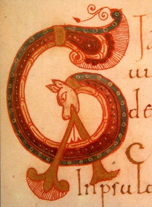 Detail from cover of: Portela Silva, E. (2001) (in Spanish) García II de Galicia: El rey y el reino (1065-1090), Burgos ISBN: 84-89915-16-4.